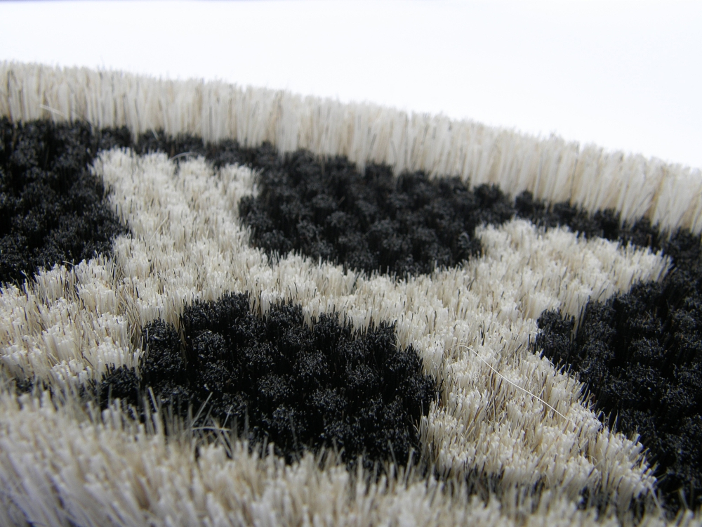 Kardaetsche